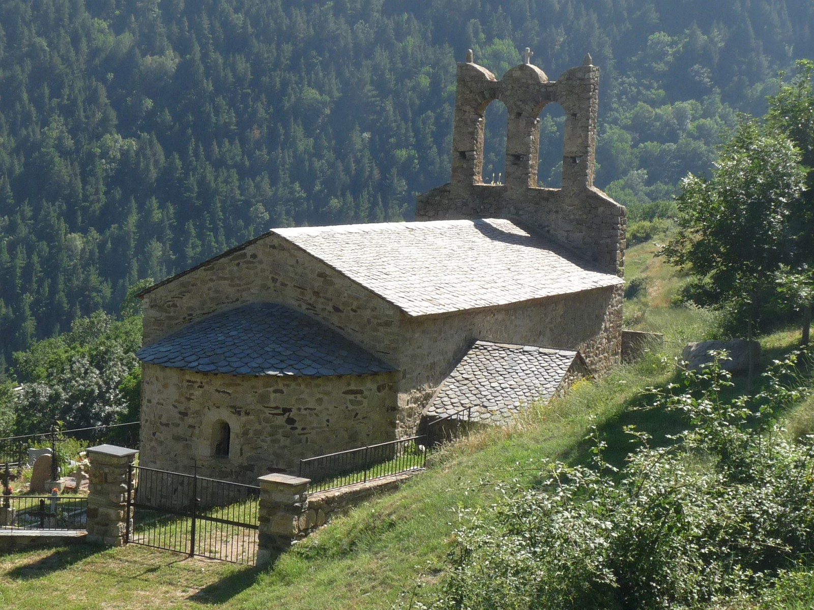 Vieille église, Sansa, Pyrénées-Orientales, France